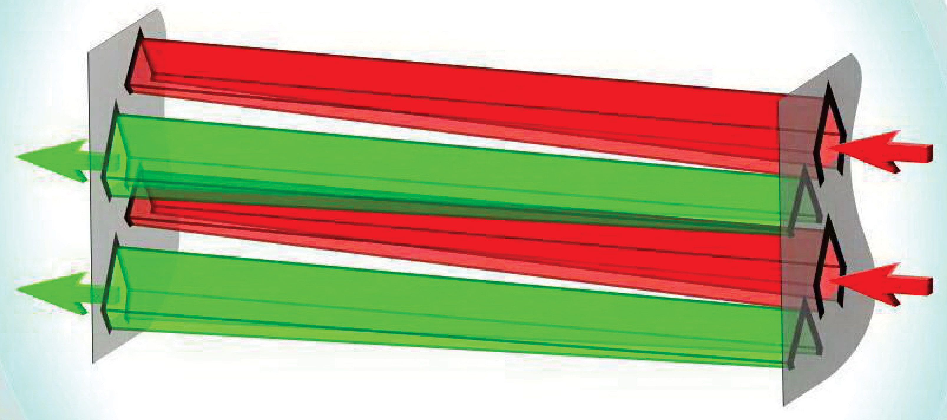 Принцип прохождения воздуха в зерносушилках смешанного потока. Горячий воздух (рабочий агент) подаётся в красные воздуховоды, равномерно проходит сквозь слой зерна и отработанный воздух выходит из зелёных воздуховодов с другой стороны зерносушилки.